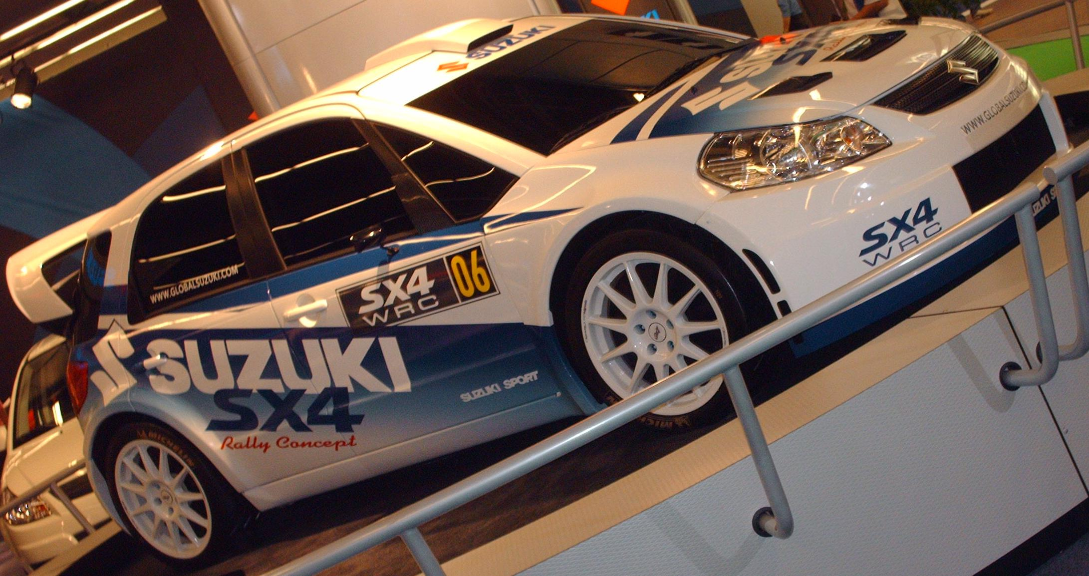 Suzuki SX4 WRC photographed at le Salon International de l'auto de Montréal 2007.